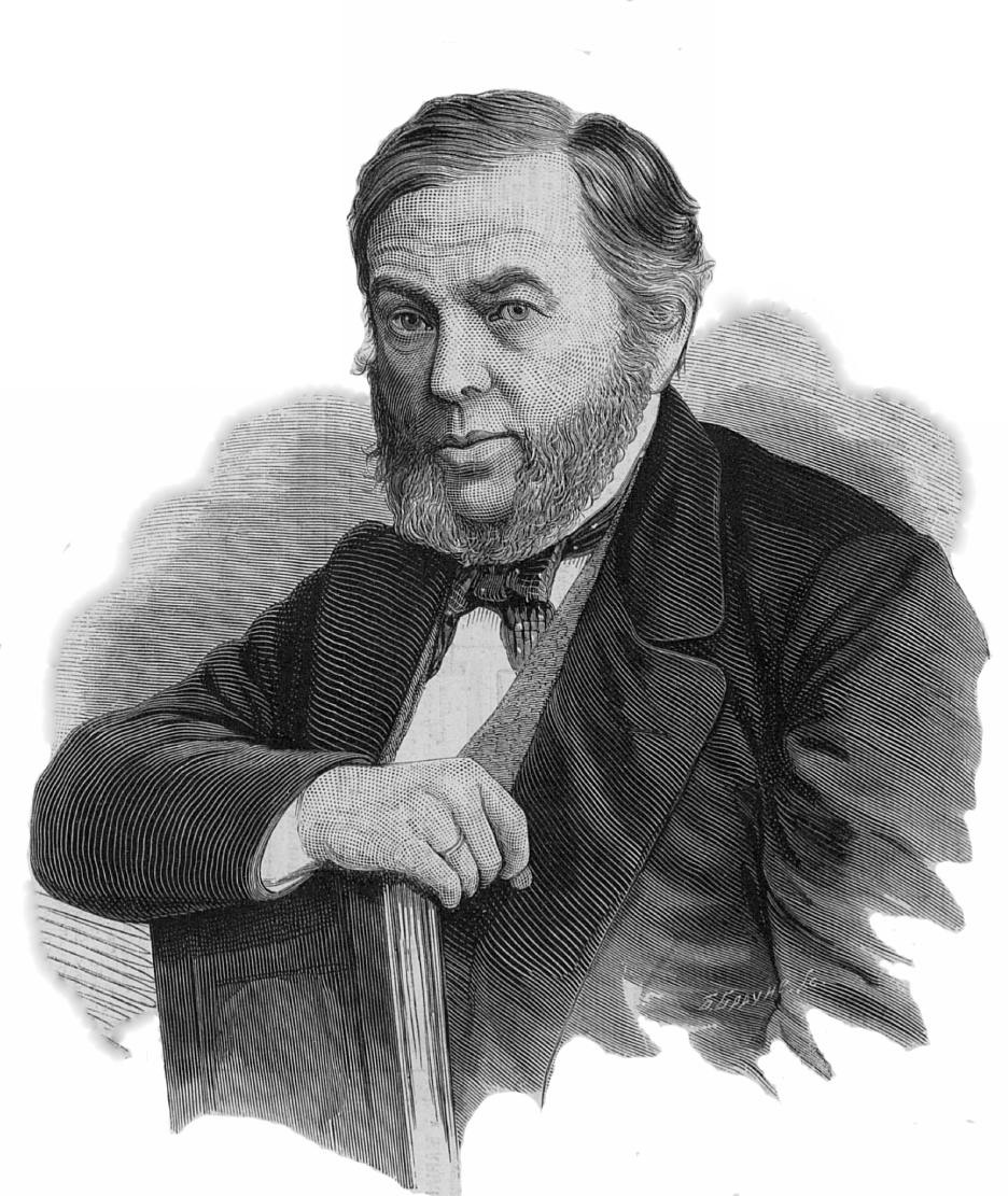 Резанов, Александр Иванович, начало 1880-х